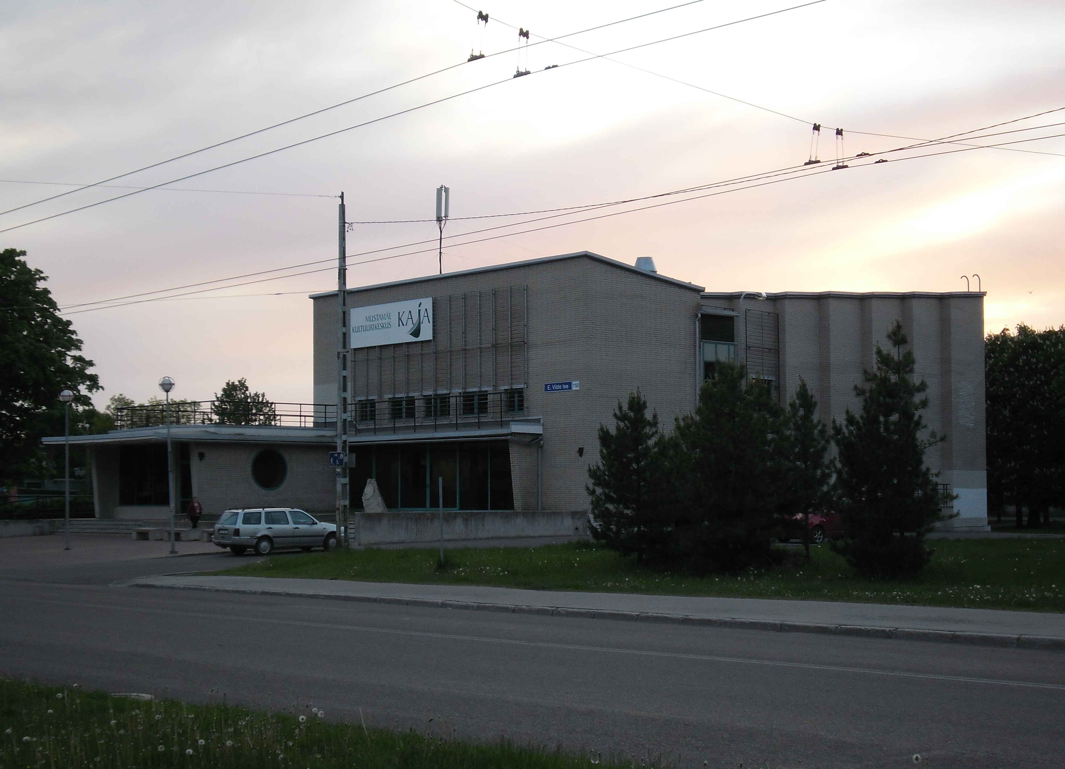 Endise kino Kaja hoone Tallinnas Mustamäel aadressil Eduard Vilde tee 118